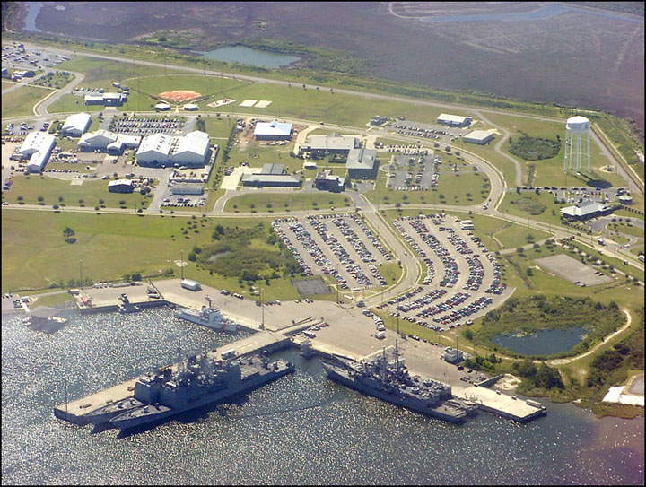 NS_Pascagoula